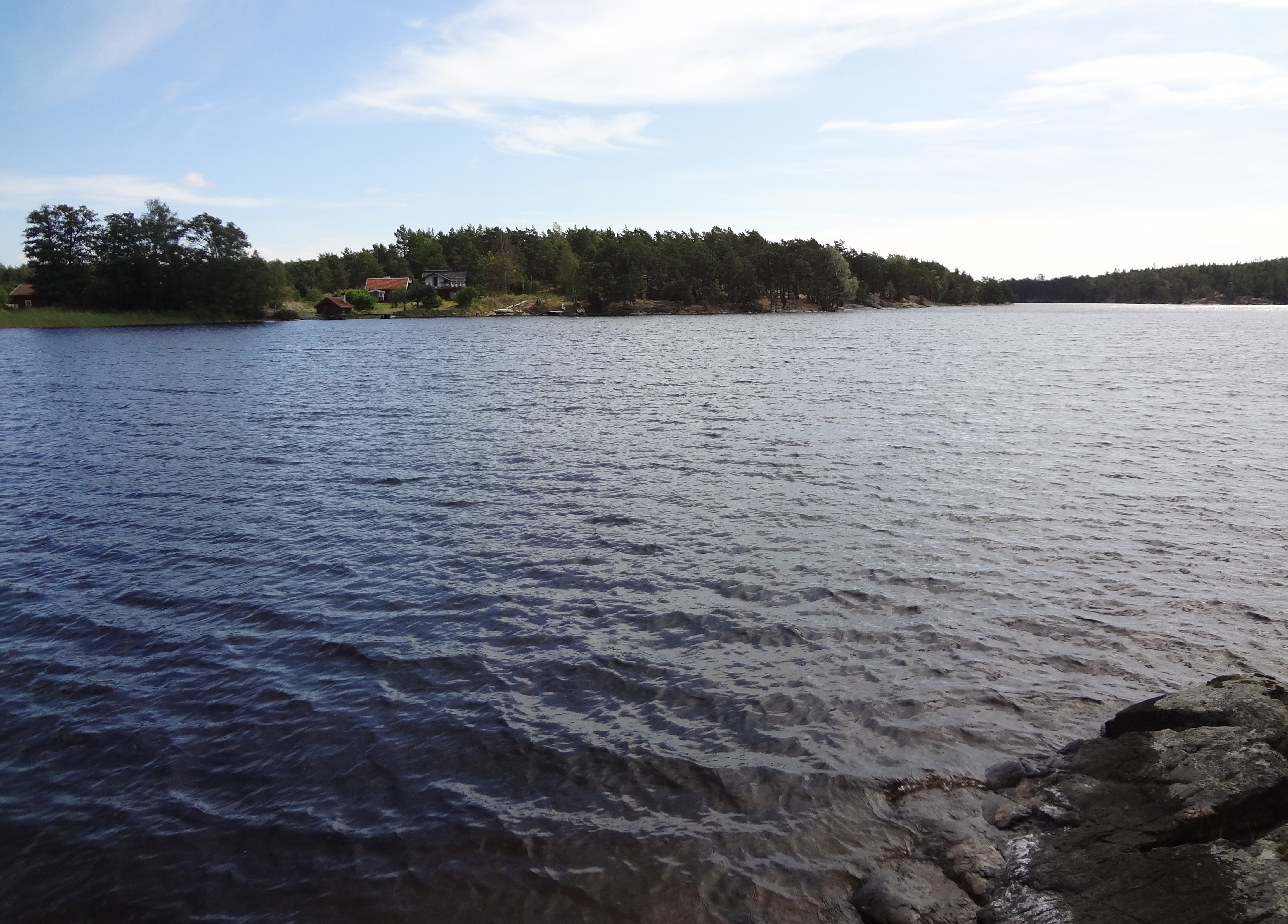 Sjön Hemträsket på Ornö, gården Svinåker syns till höger.